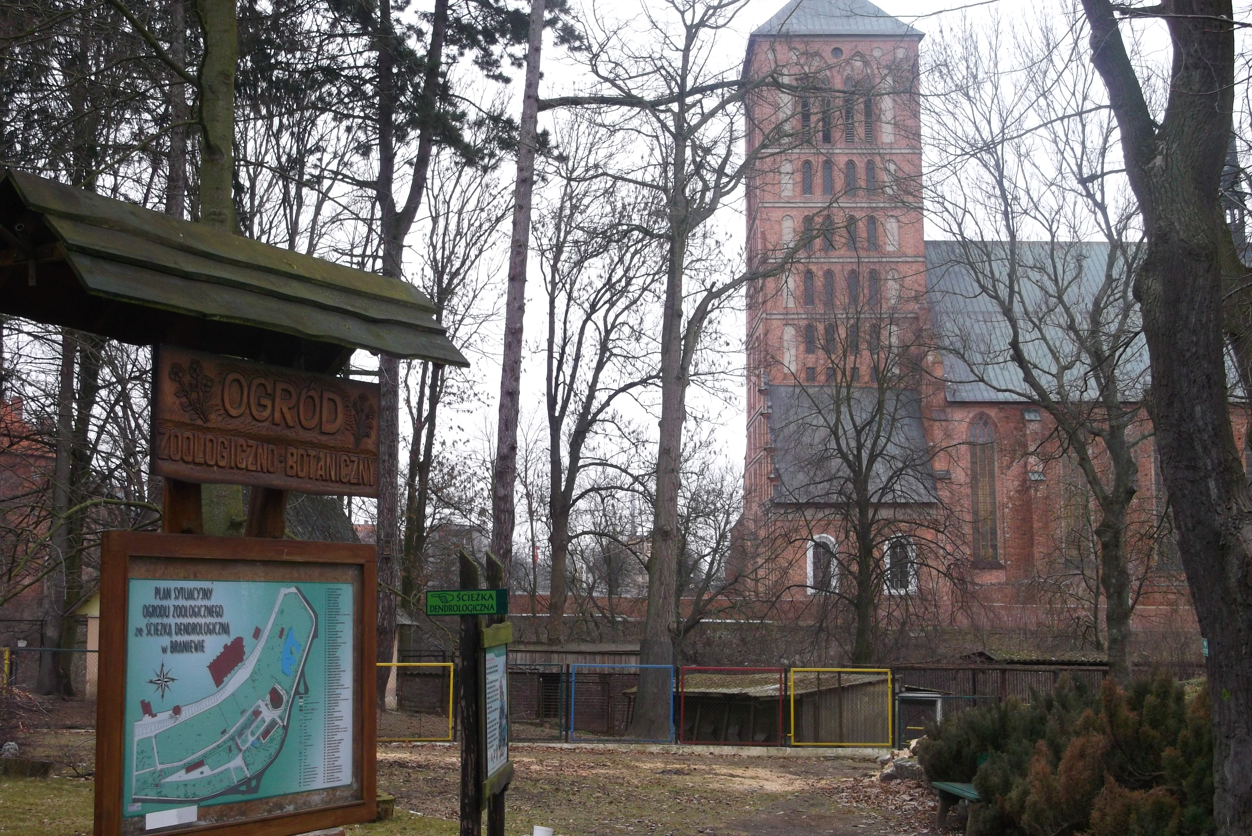 Zoo, ogród zoologiczny w Braniewie